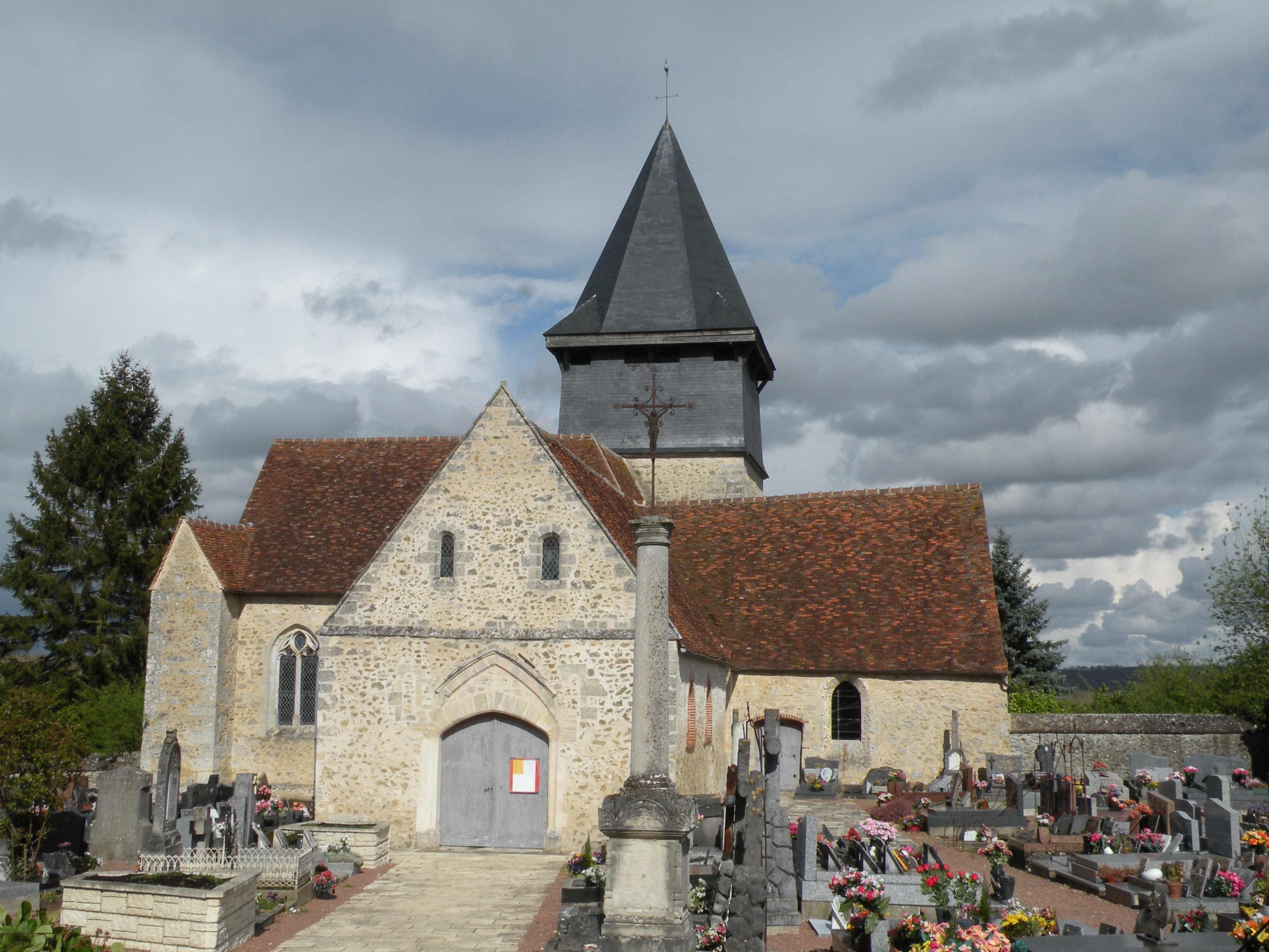 église de Villers-Saint-Sépulcre